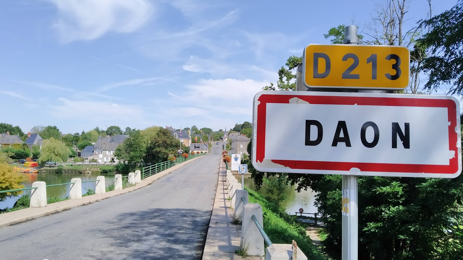 L'entrée et le pont de Daon (Mayenne, France).